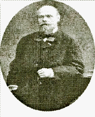 Портрет Костянтина Павловича Башкірцева. Portrait of Constantine Pavlovich Bashkirtseff. Portrait de Constantin Pavlovitch Bashkirtseff.